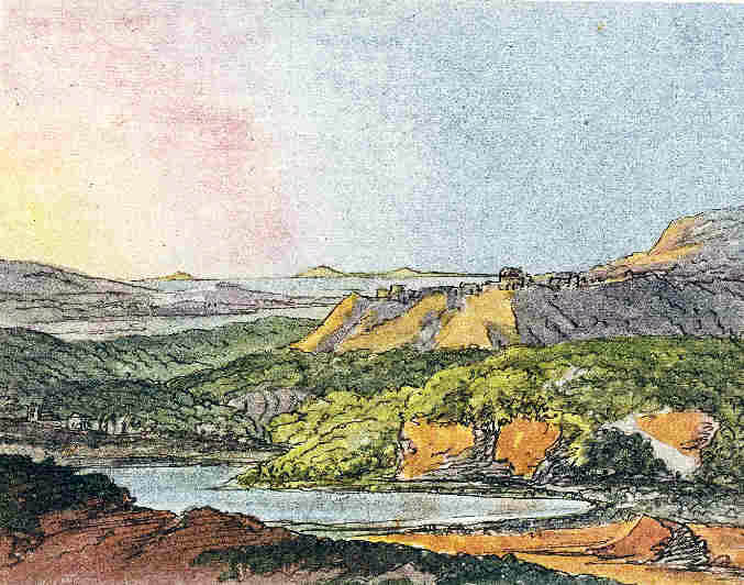 Goethe, Italienische Küstenlandschaft - Aquarellierte Federzeichnung, ca. 1787 Ort noch unbekannt